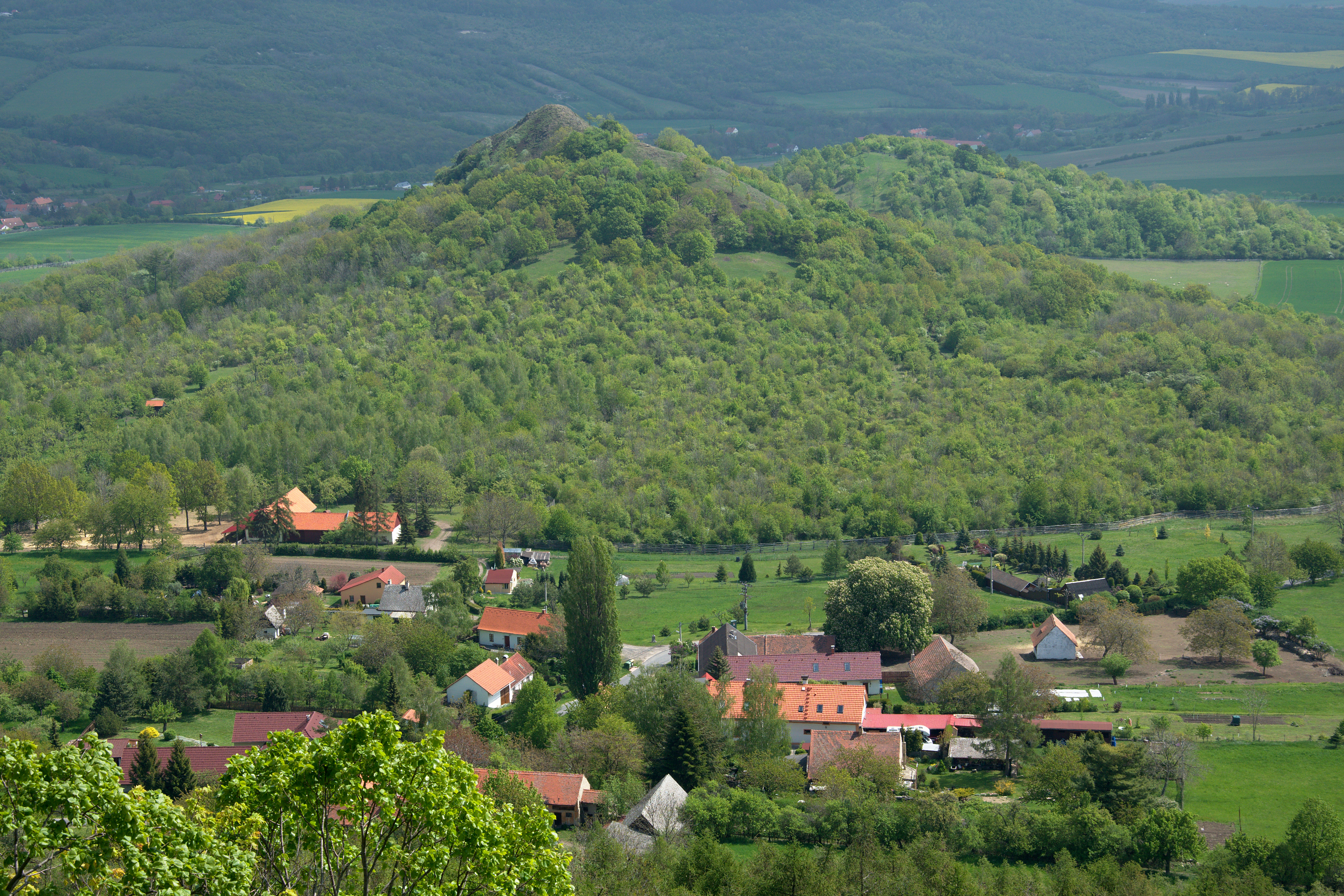 Děkovka a vrch Plešivec – pohled z Oltáříku